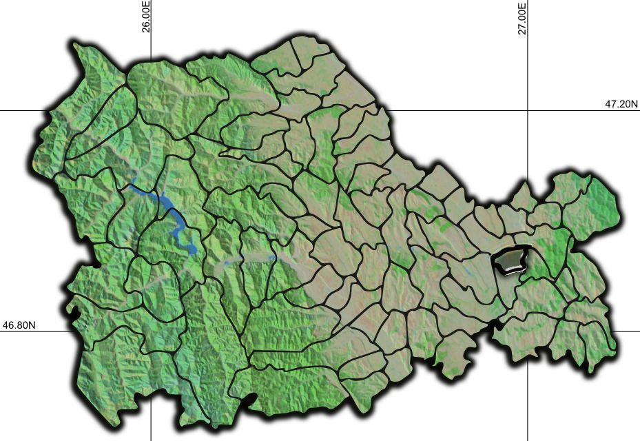 Roman jud Neamt.